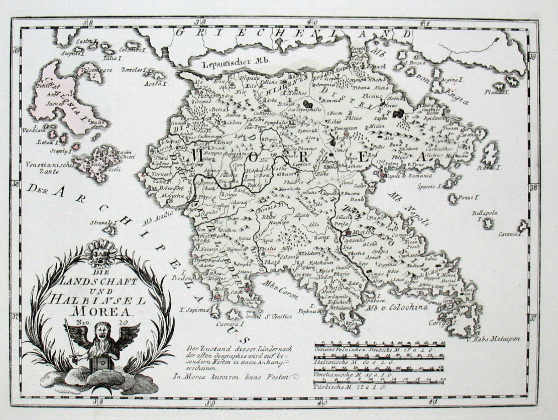 Die Landschaft und Halbinsel Morea. Nro. 20. Kolorierter Kupferstich